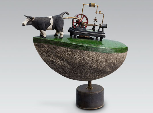 Werk von Rainer Sperl. Eine Kuh angeschlossen an eine Dampfmaschine.